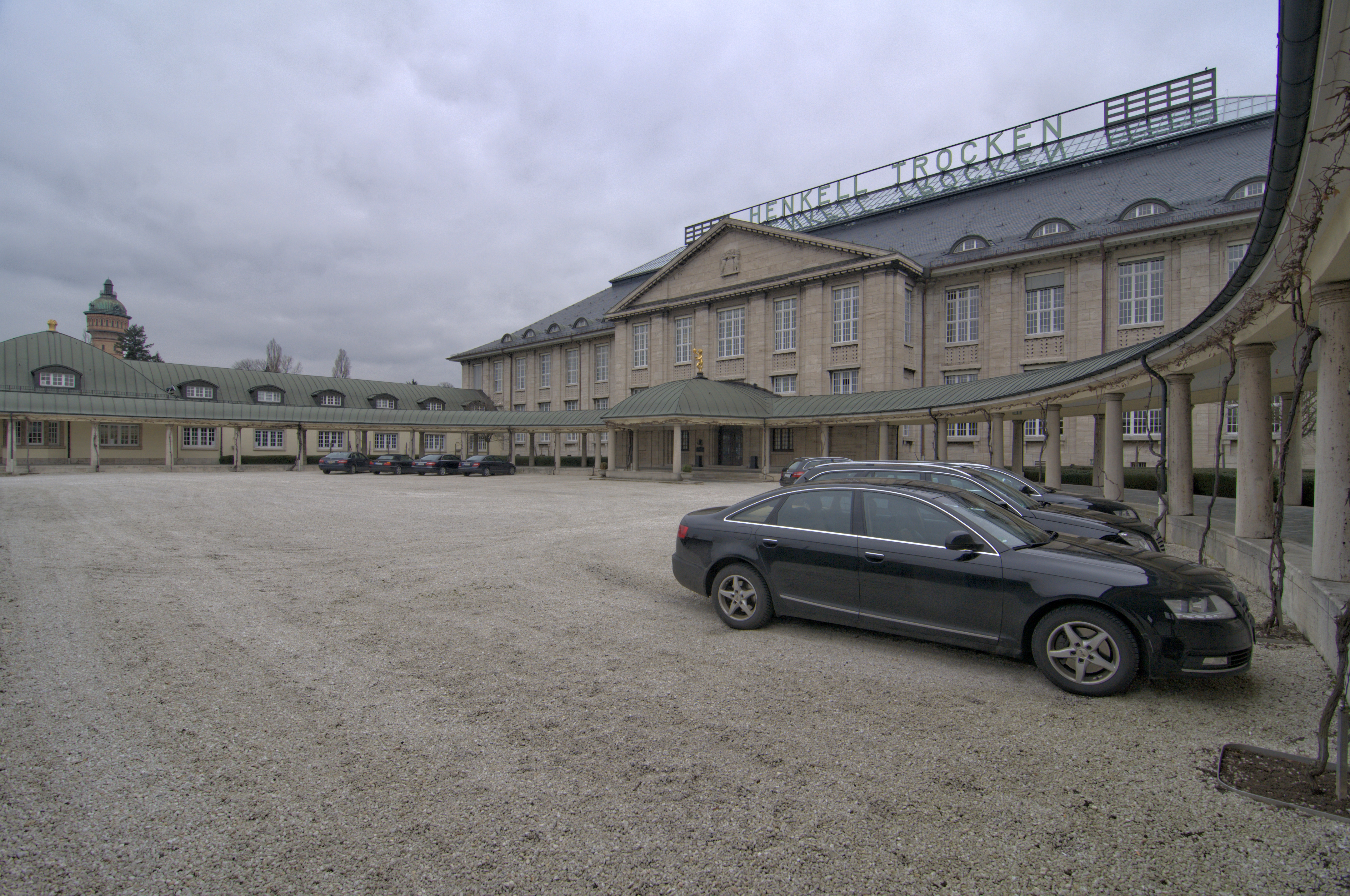 Sektkellerei Henkell Wiesbaden Wikipedia im Landtag – Hessen 26.–28. Februar 2013 in Wiesbaden Fragen zur Nachnutzung Wenn Sie Fragen zur Nachnutzung dieses Bildes haben, können Sie sich jederzeit gern an wenden